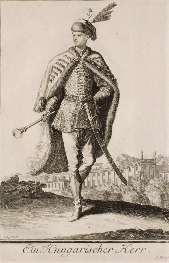 Ein Hungarischer herr